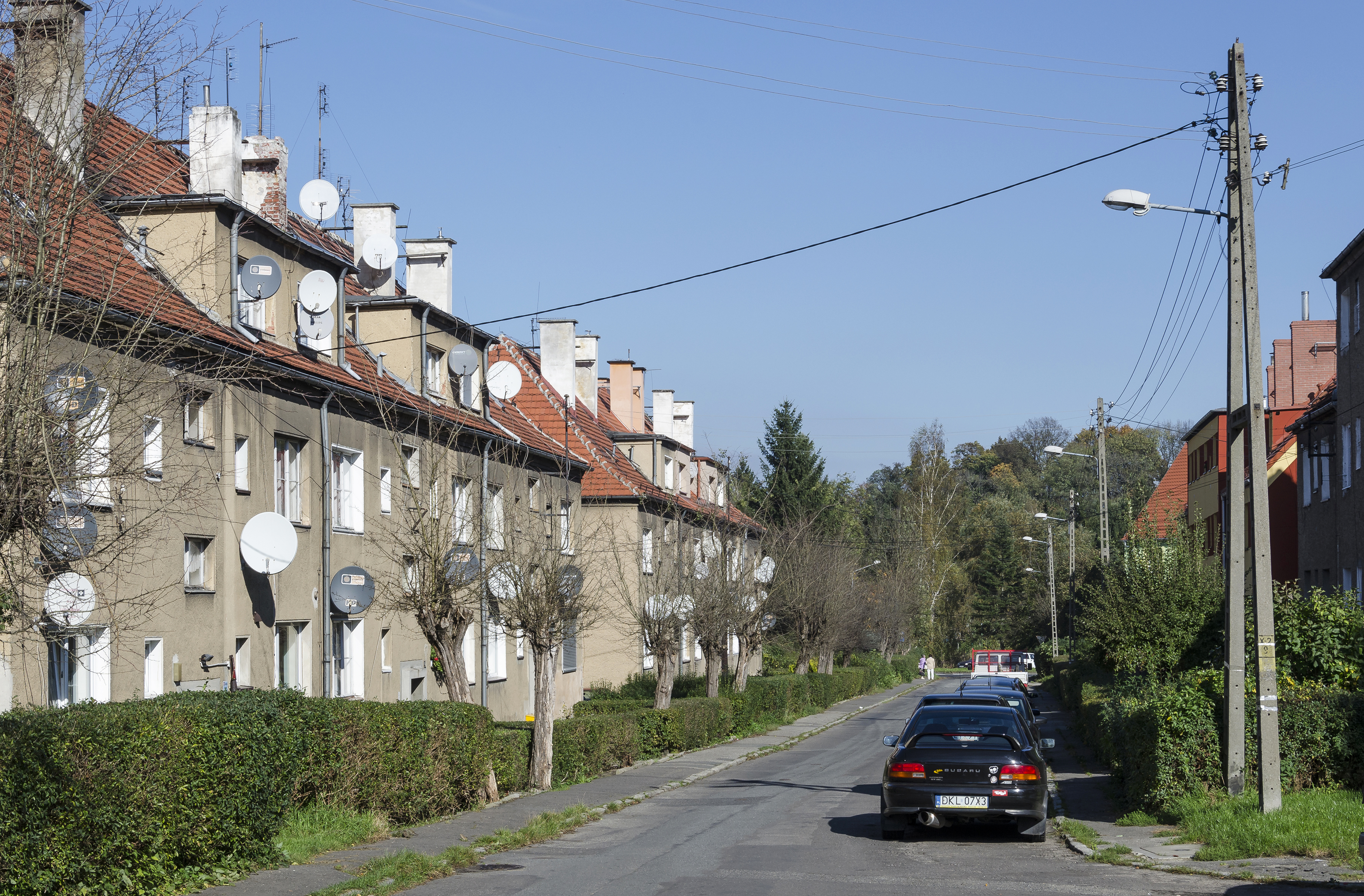 Kłodzko, ul. Ptasia